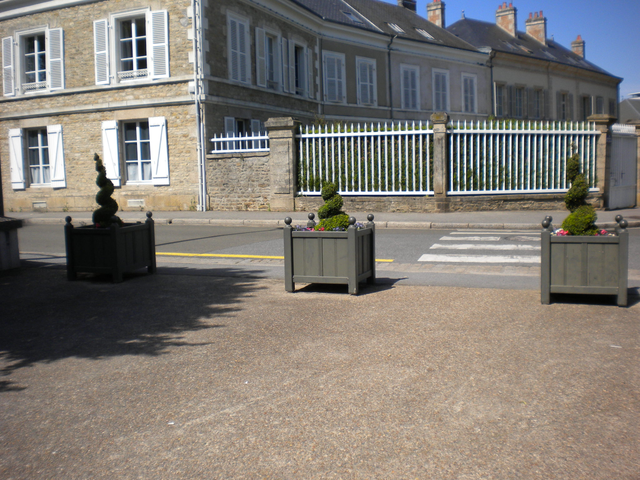 Alençon, arbustes taillés à l'entrée du parc